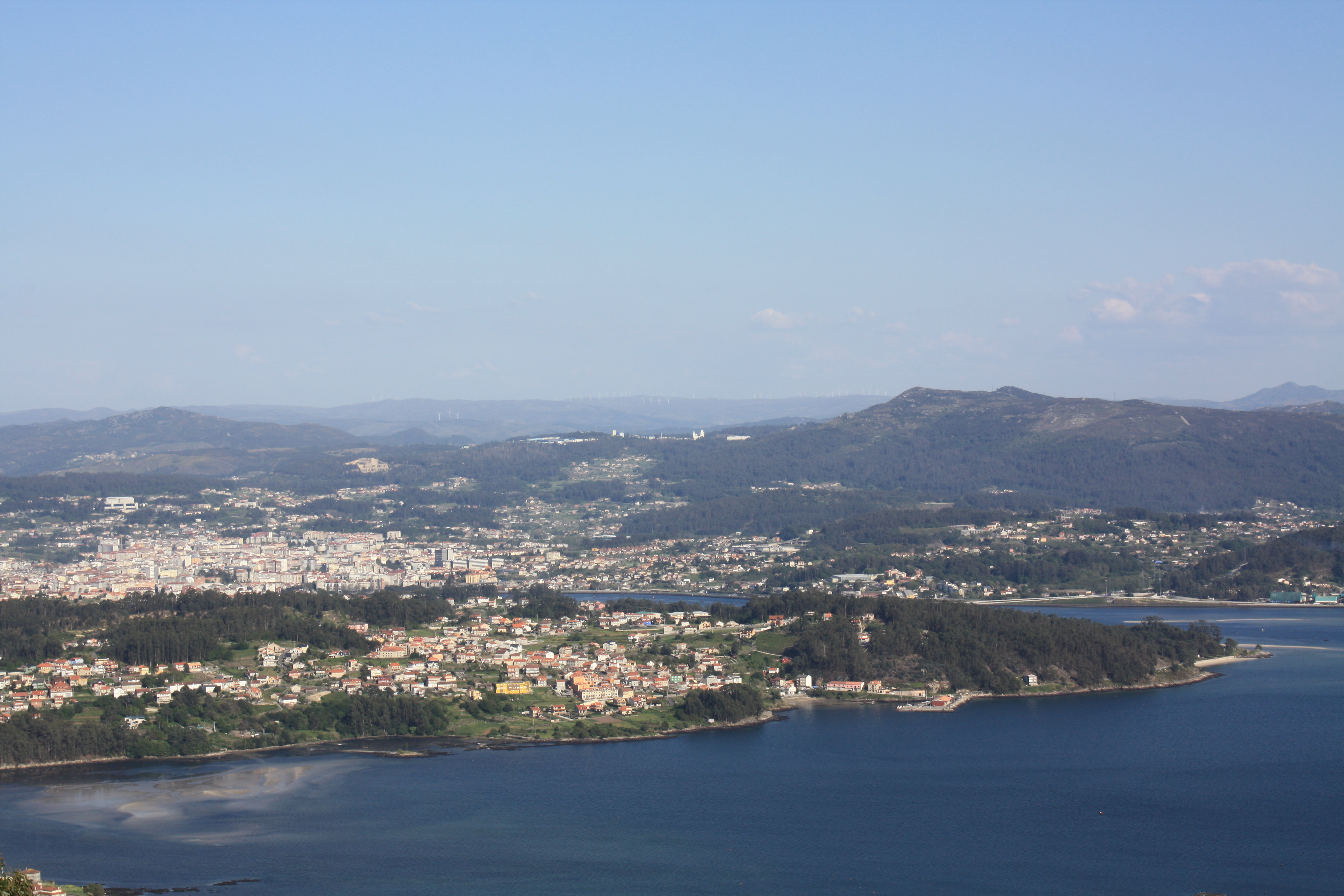 Vista de Poio (parroquia de Campelo) (Pontevedra), en primeiro plano; e de Pontevedra ó fondo, desde o Mirador de Loureiro (en Combarro, Poio).